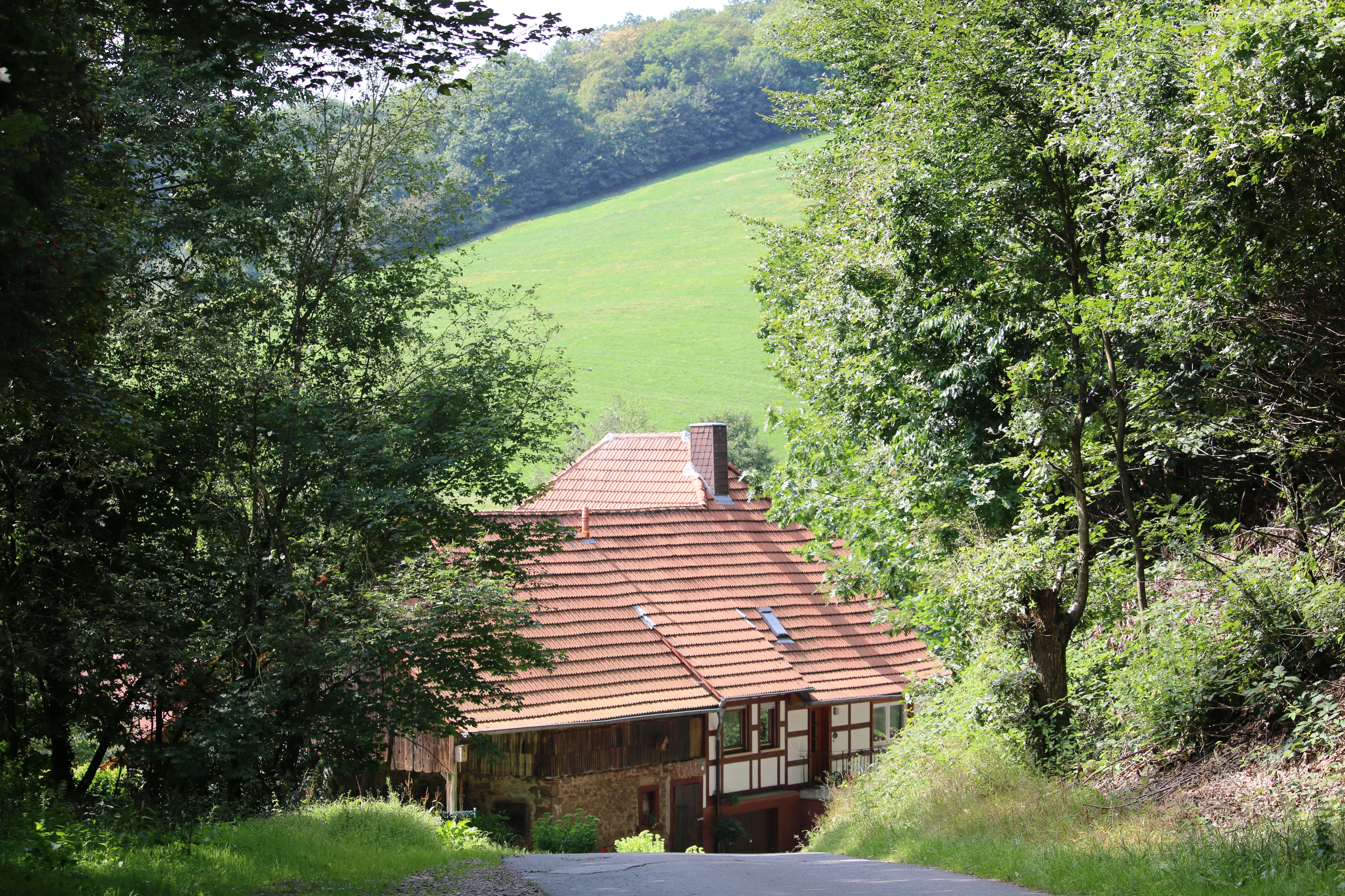 Gadern, Gehöft an der Gaderner Straße